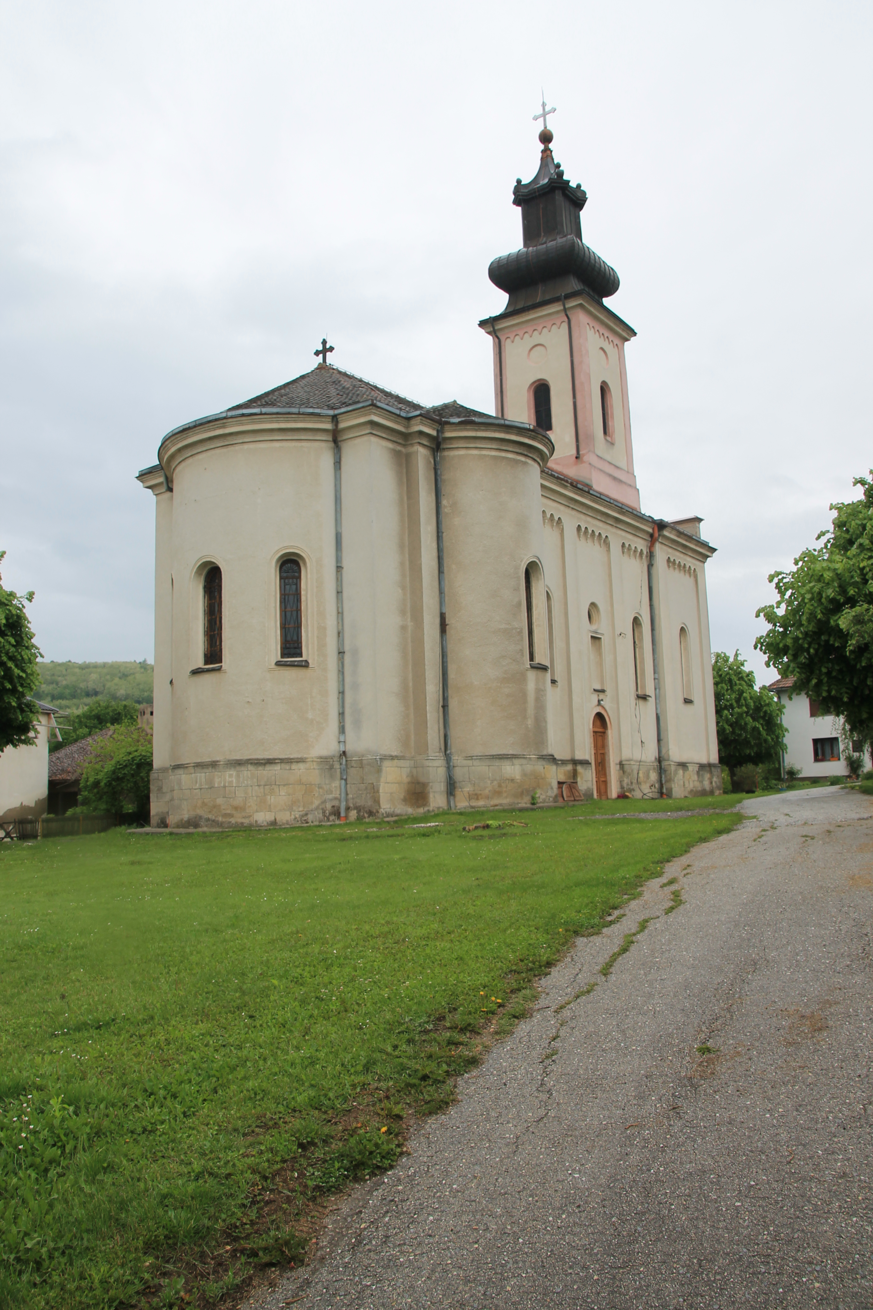 Crkva Preobraženja Gospodnjeg (Žabare)